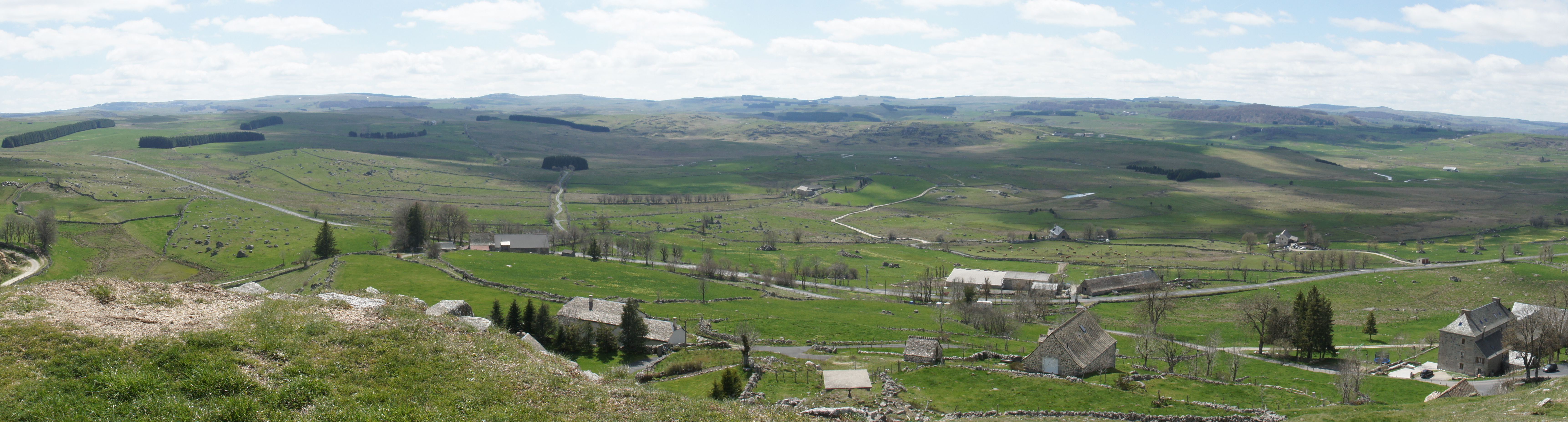 Vue ouest depuis le sommet, avec la cascade du Déroc en fond à droite